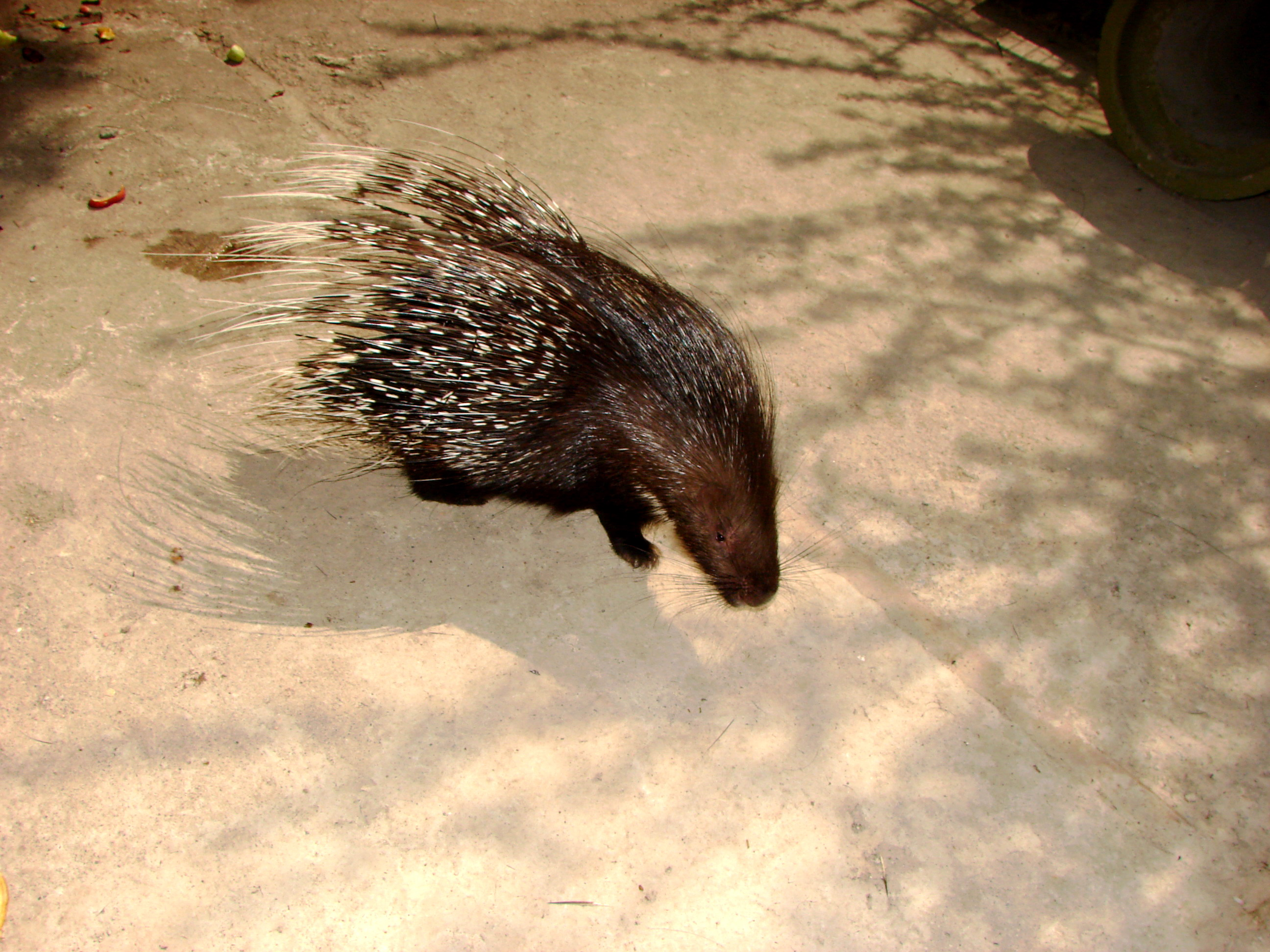 Bogazici Zoo